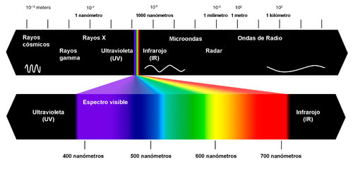 Espektro elektromagnetiko osoa.